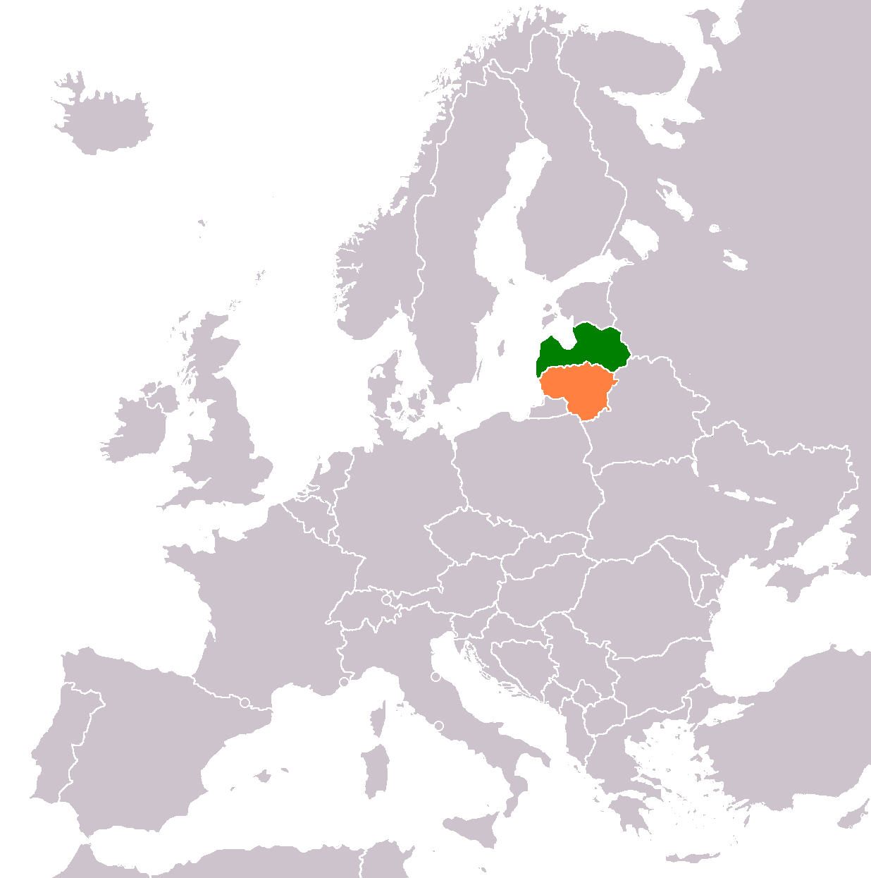 Latvia-Lithuania locator map.